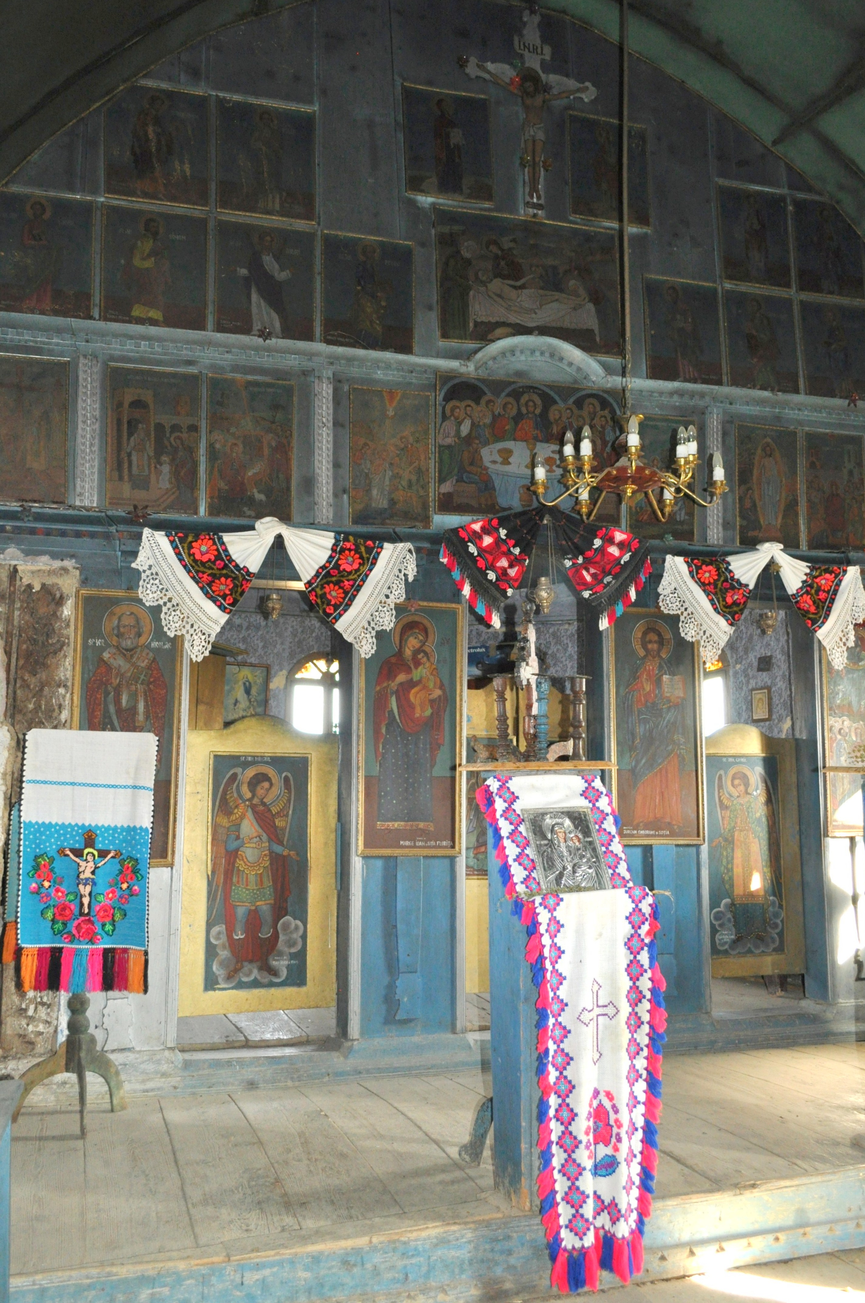 Biserica de lemn „Nașterea Maicii Domnului” din Săucani, județul Bihor